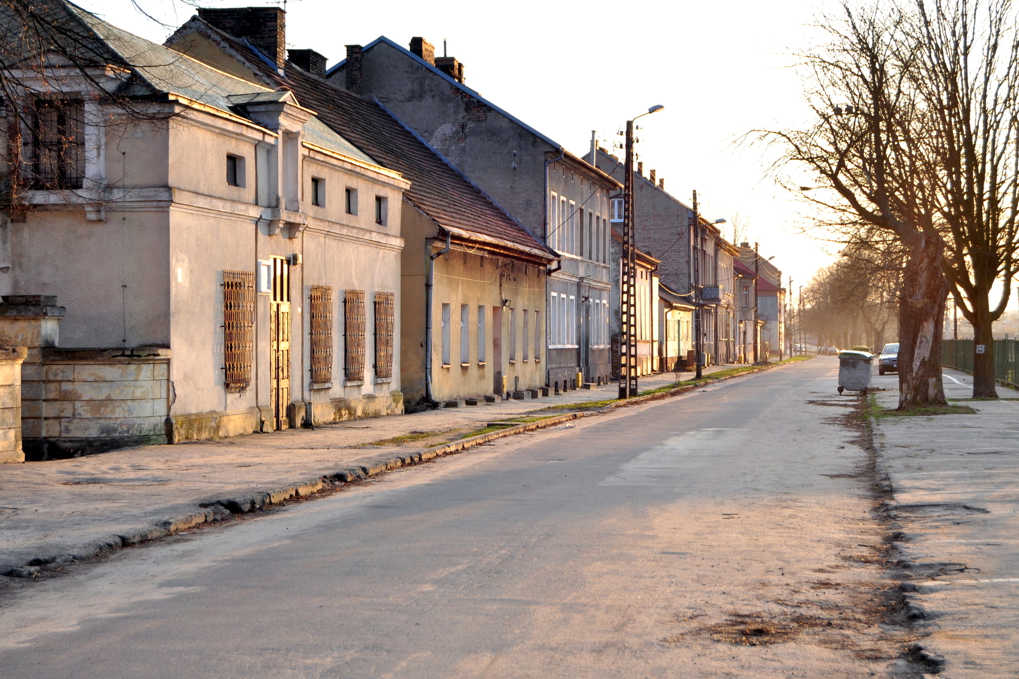 Gorzów Wlkp., Zawarcie. Ulica Wał Okrężny z nieistniejącą dziś pierzeją, którą rozebrano pod planowane biurowce, w tym Urząd Miasta (pomysł zarzucono)